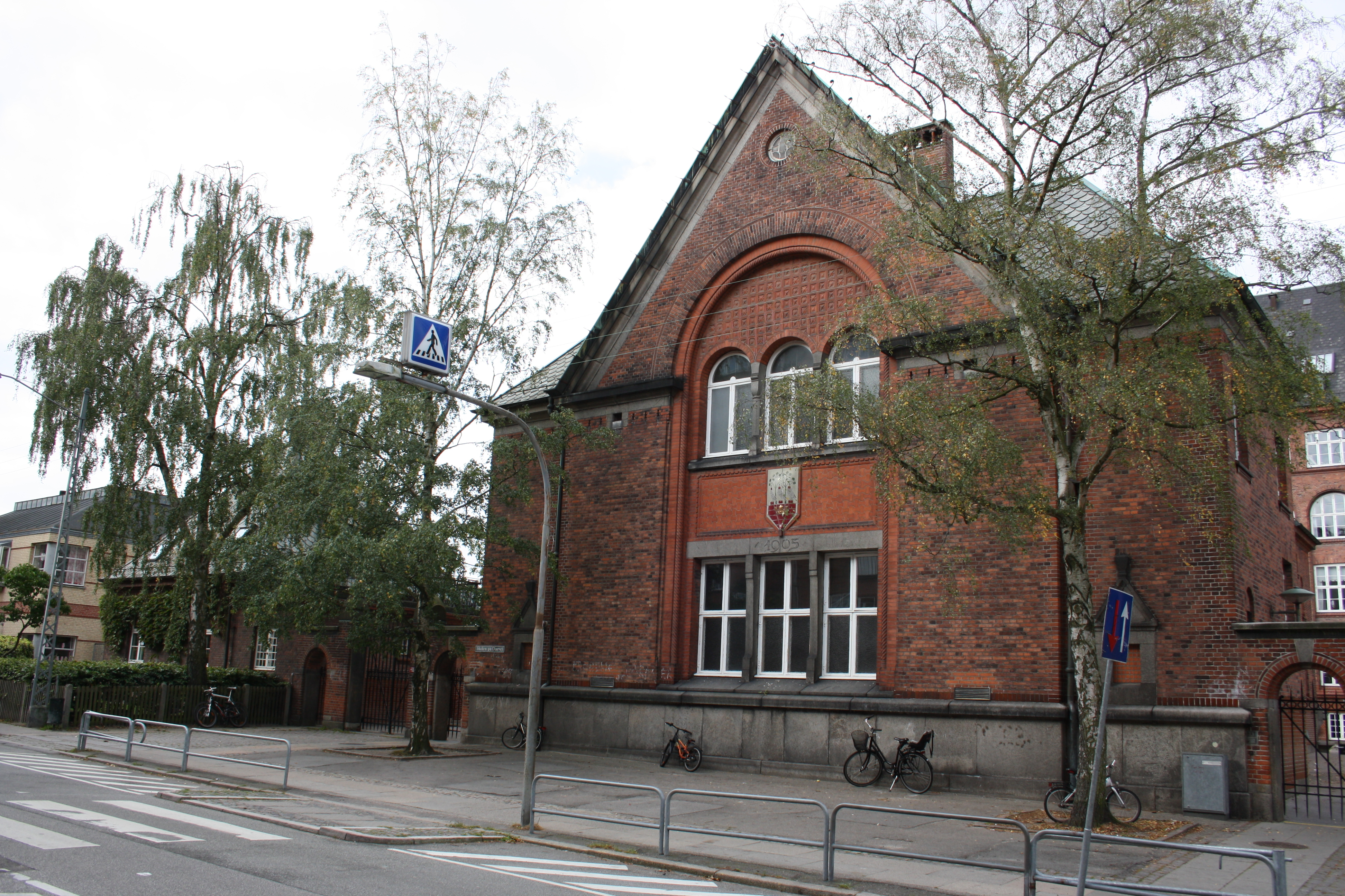 Duevej 63, Frederiksberg